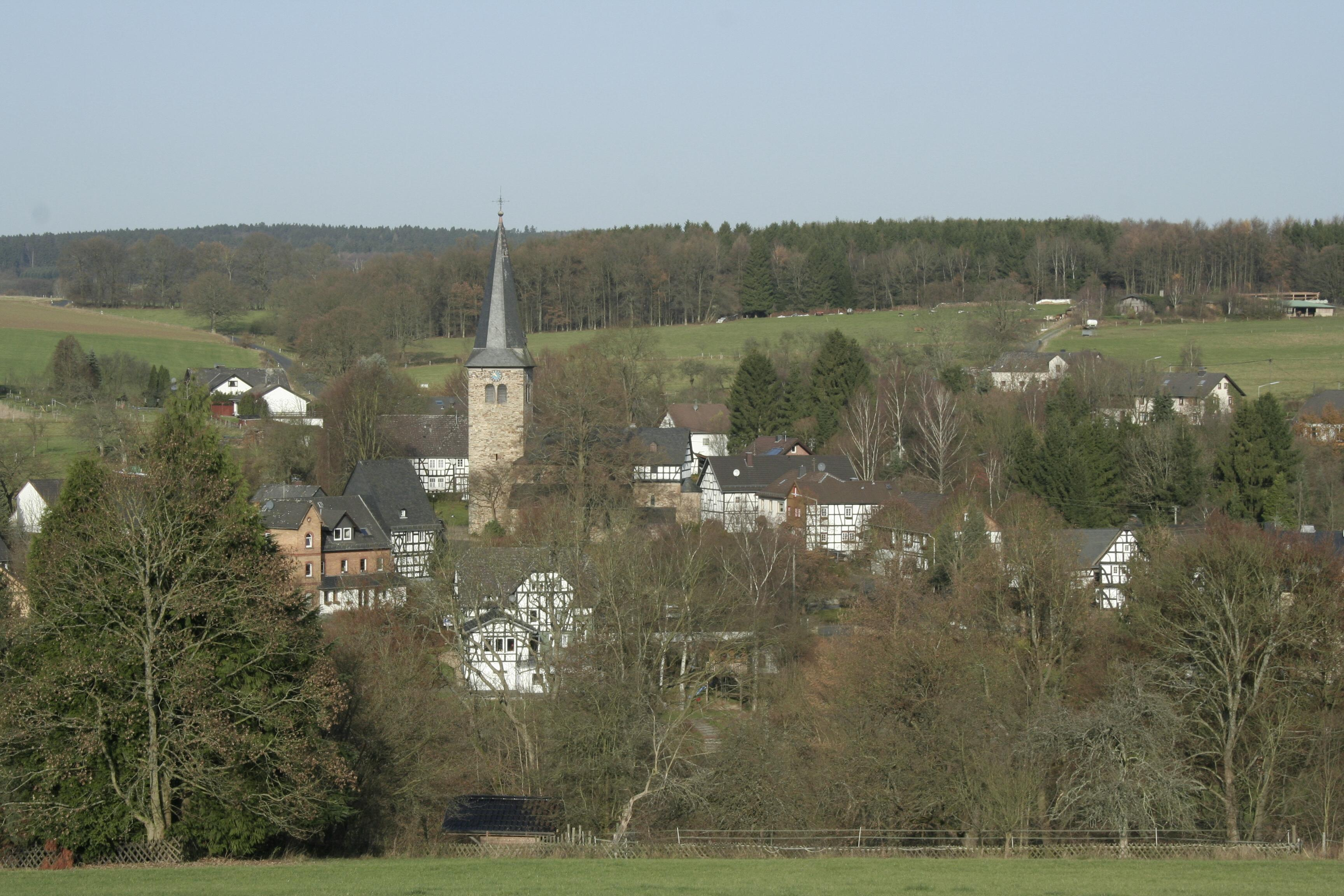 Blick über den Fachwerkort Mehren im Westerwald